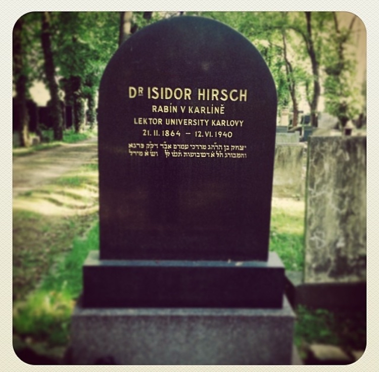 Náhrobek dr. Isidora Hirsche na Novém židovském hřbitově v Praze.